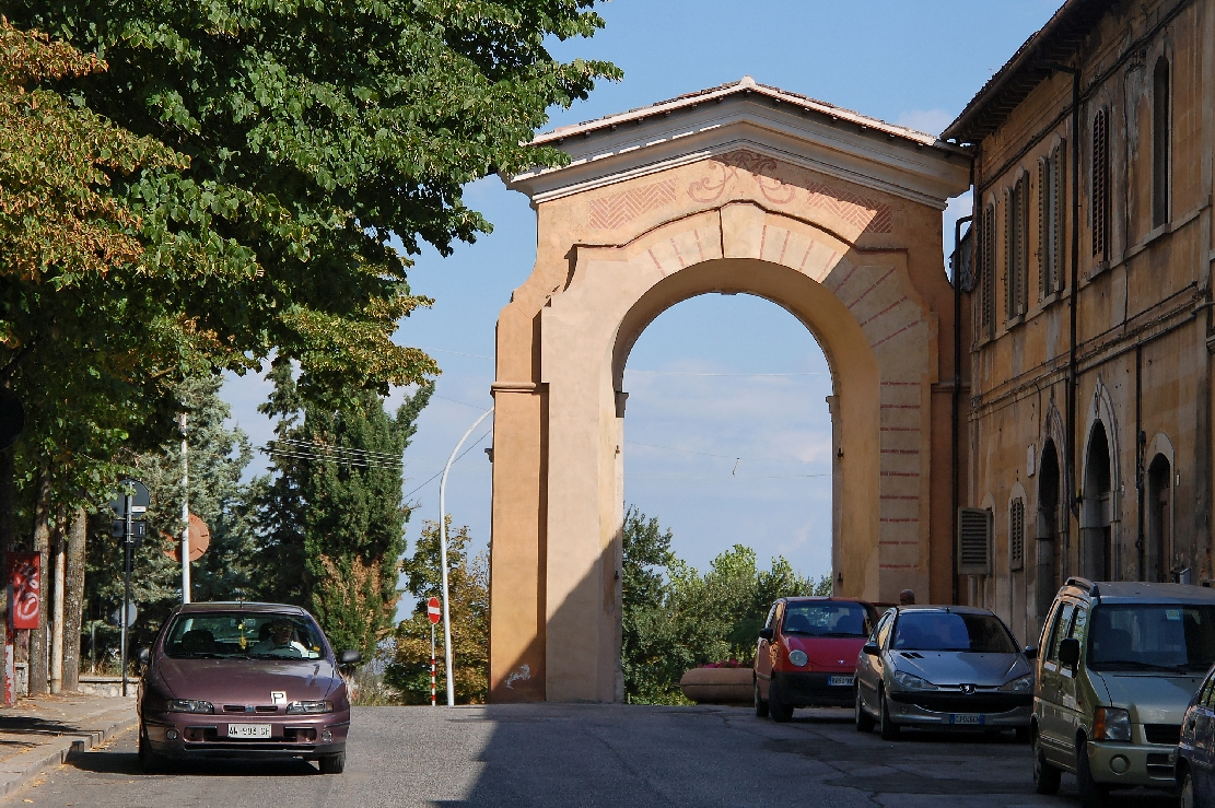 L'Aquila 2011